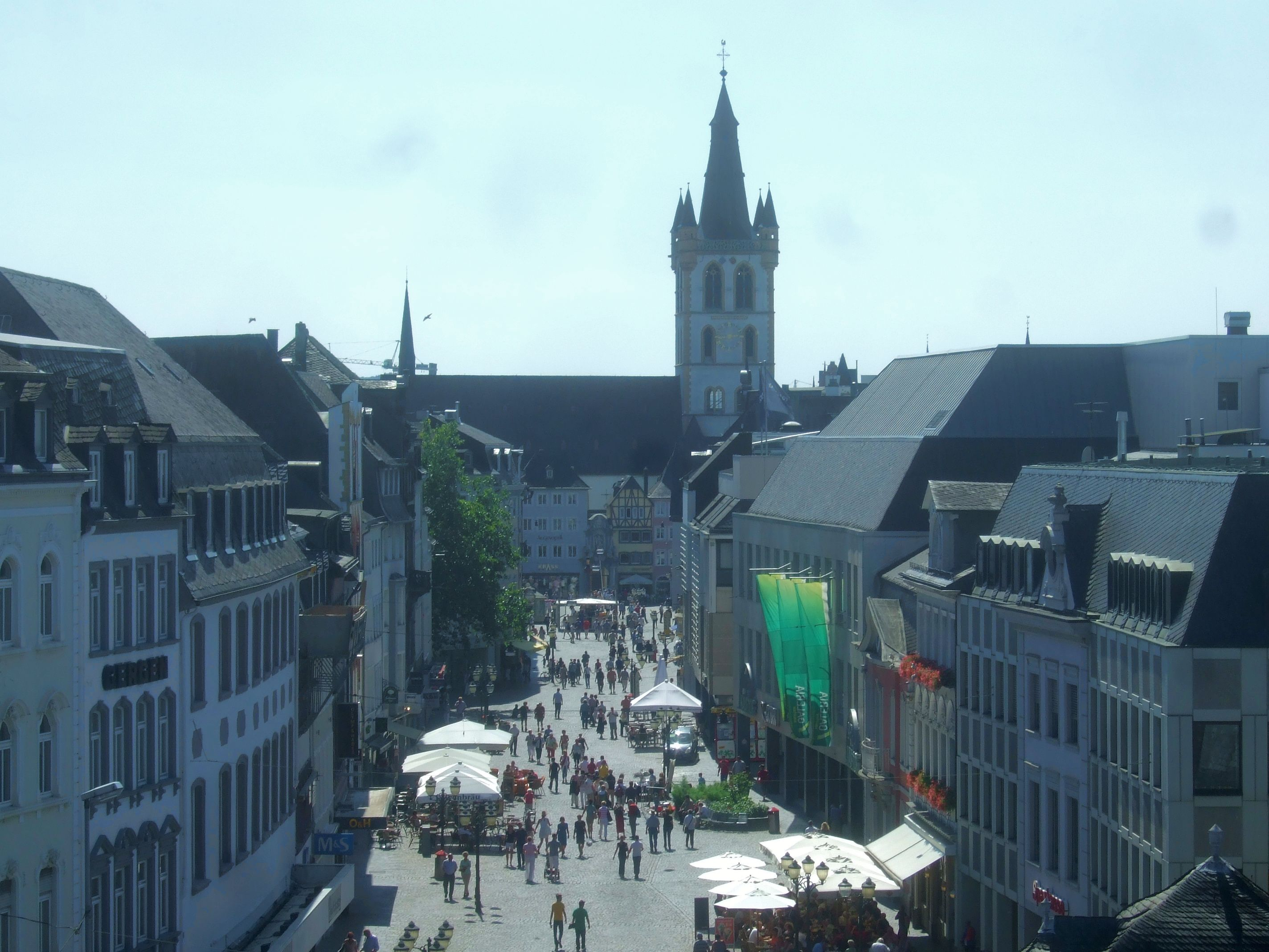 Blick aus der Porta Nigra auf Simeonstraße und St. Gangolf in Trier